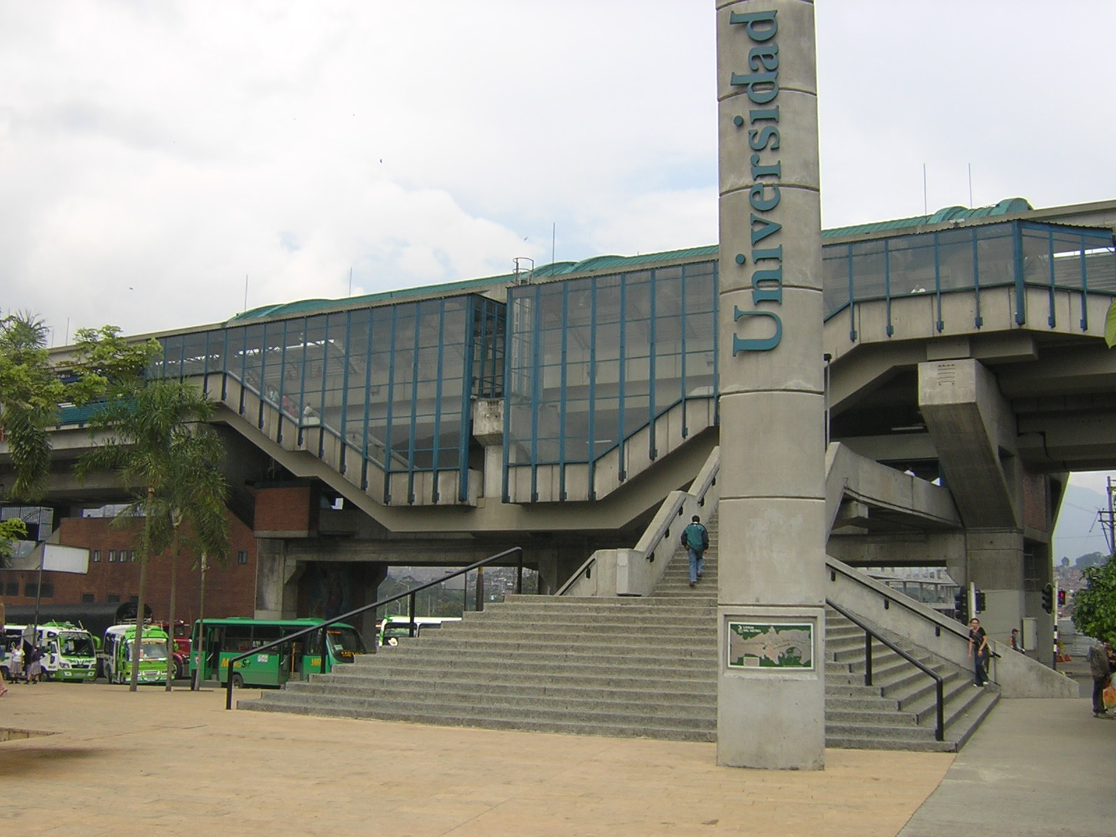 Metro de Medellín, Estación Universidad. Medellín, Colombia.